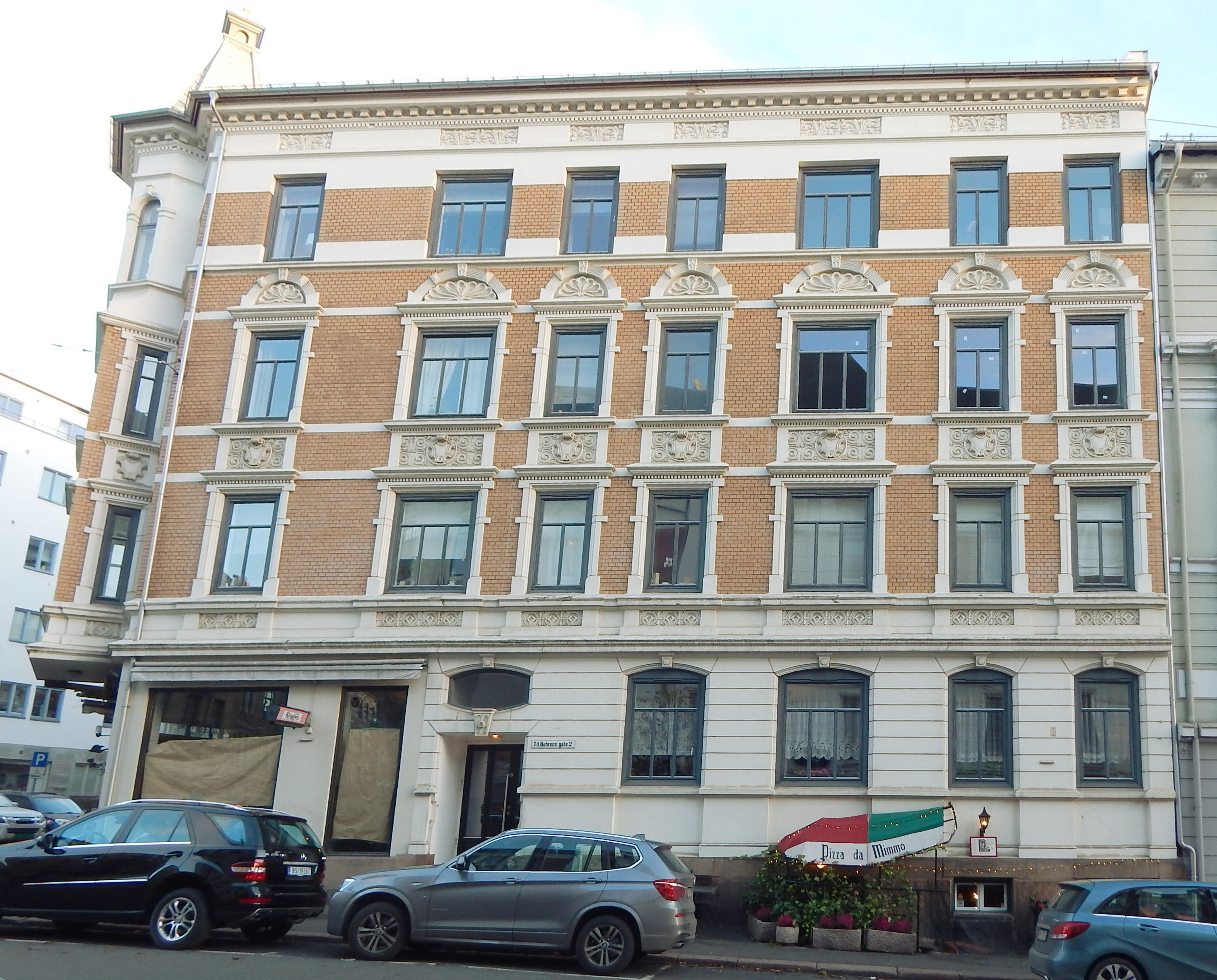 Behrens' gate 2 sett fra Skovveien